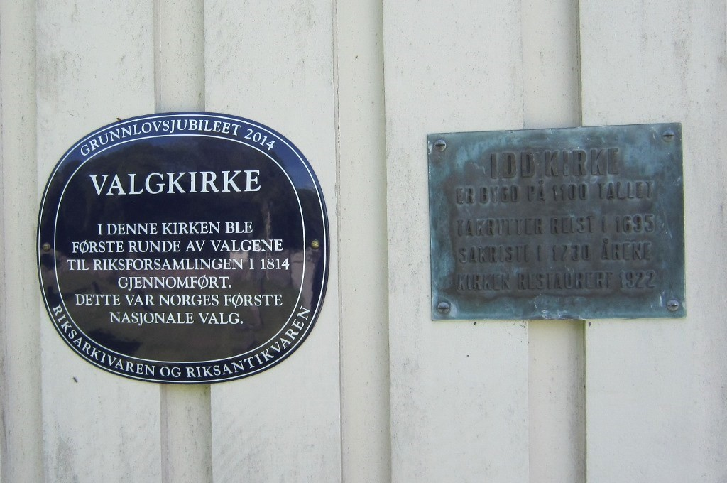 Idd kirke var valgkirke i 1814.